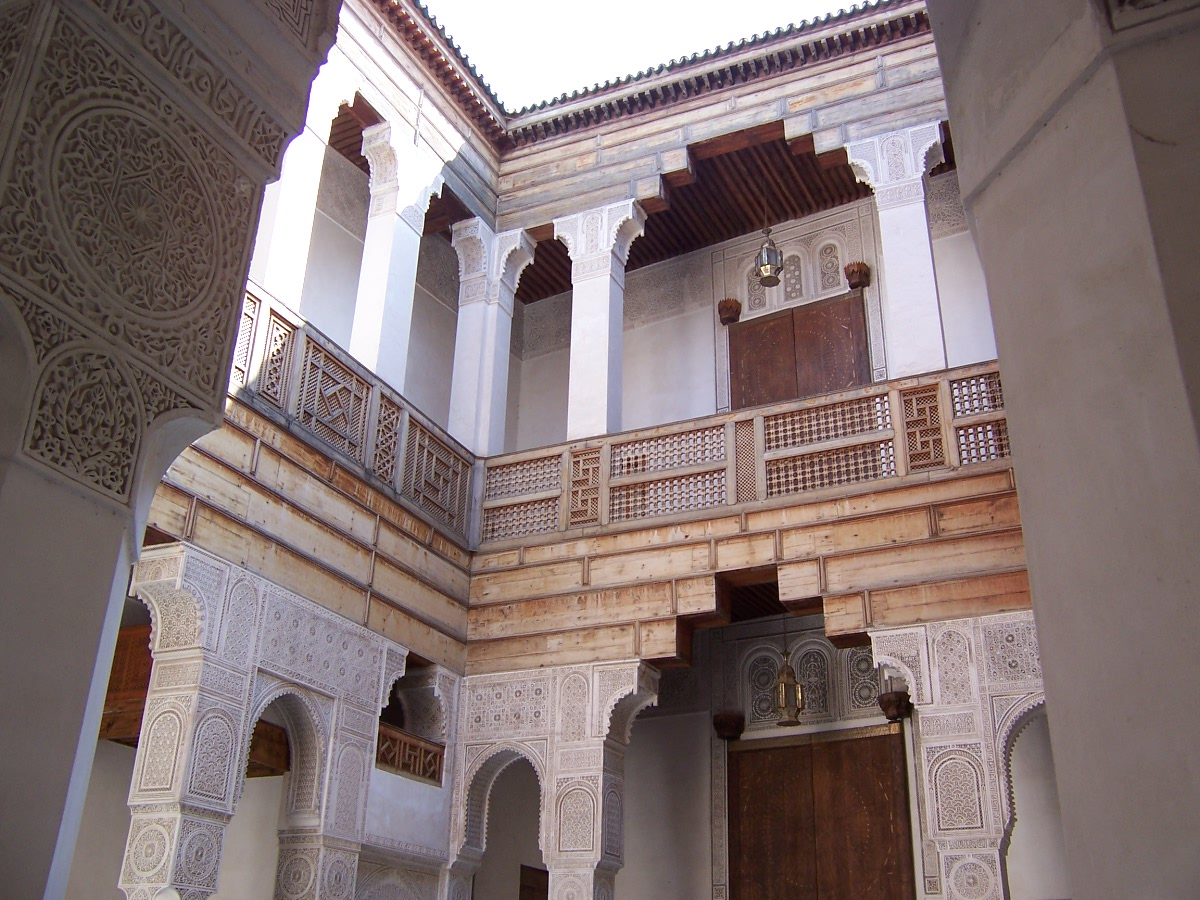 Fez, Morocco